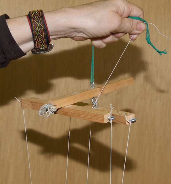 Marionettesteiergrëff. e Merci un d'Iris Manzoni an hir Marionetten.